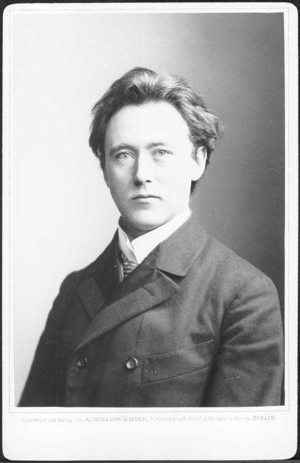 Felix Weingartner, von J. C. Schaarwächter